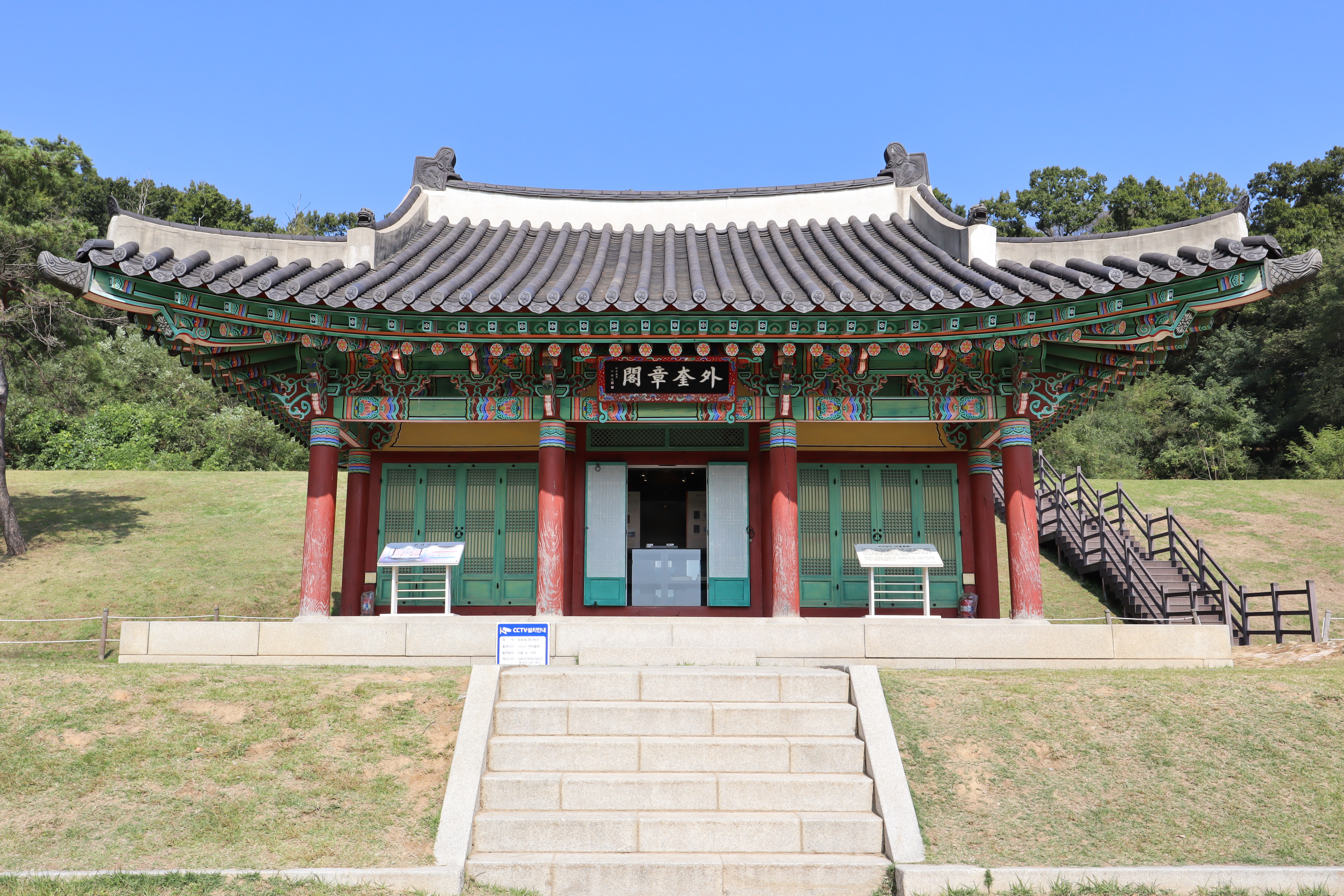 Oegyujanggak 외규장각